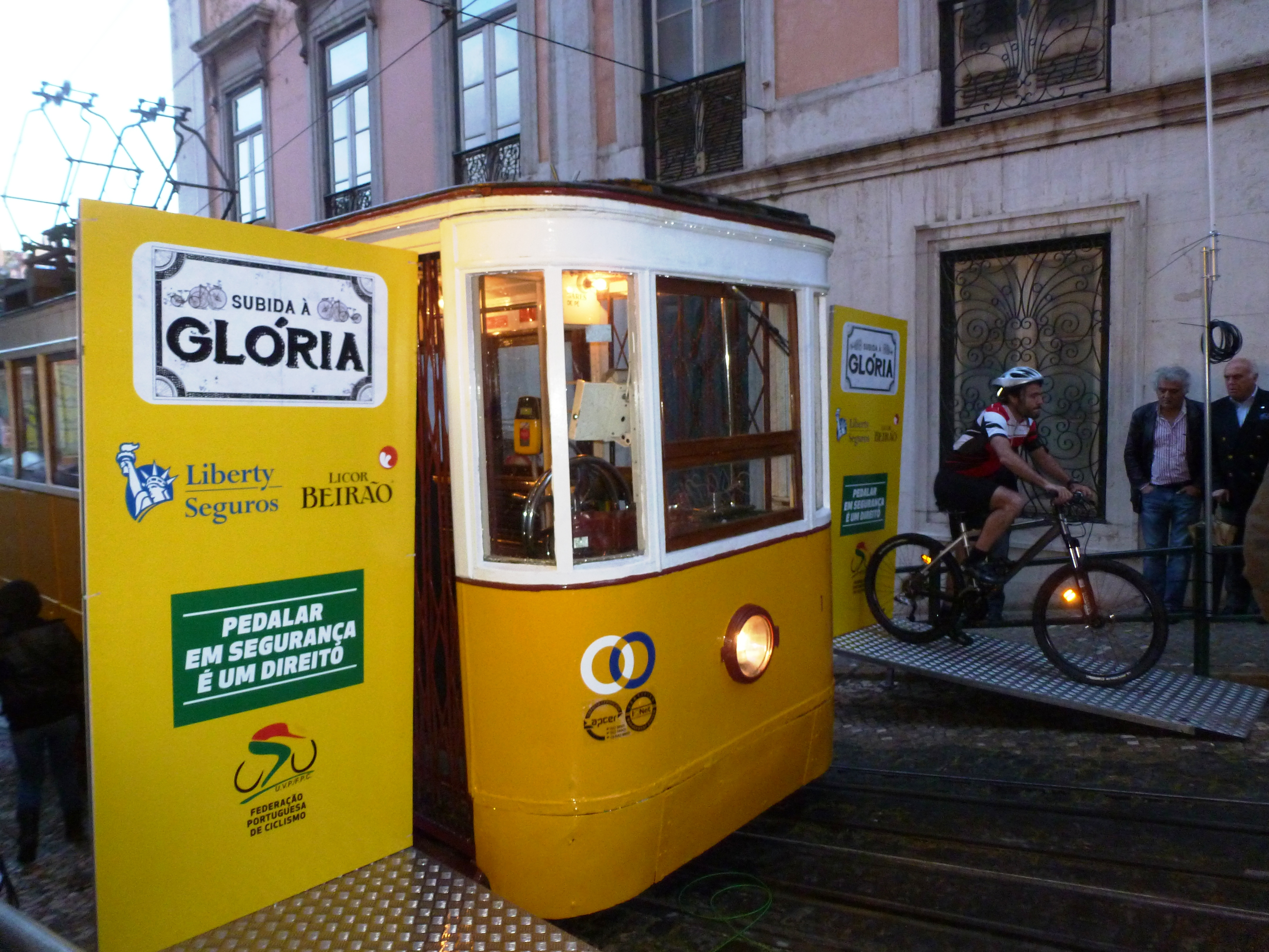 Start zum Radrennen Subida a Gloria, 17. Mai 2013